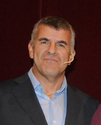 Cristina Fernández, presidenta de Argentina, junto a Dady Brieva en la presentación del programa conectar igualdad